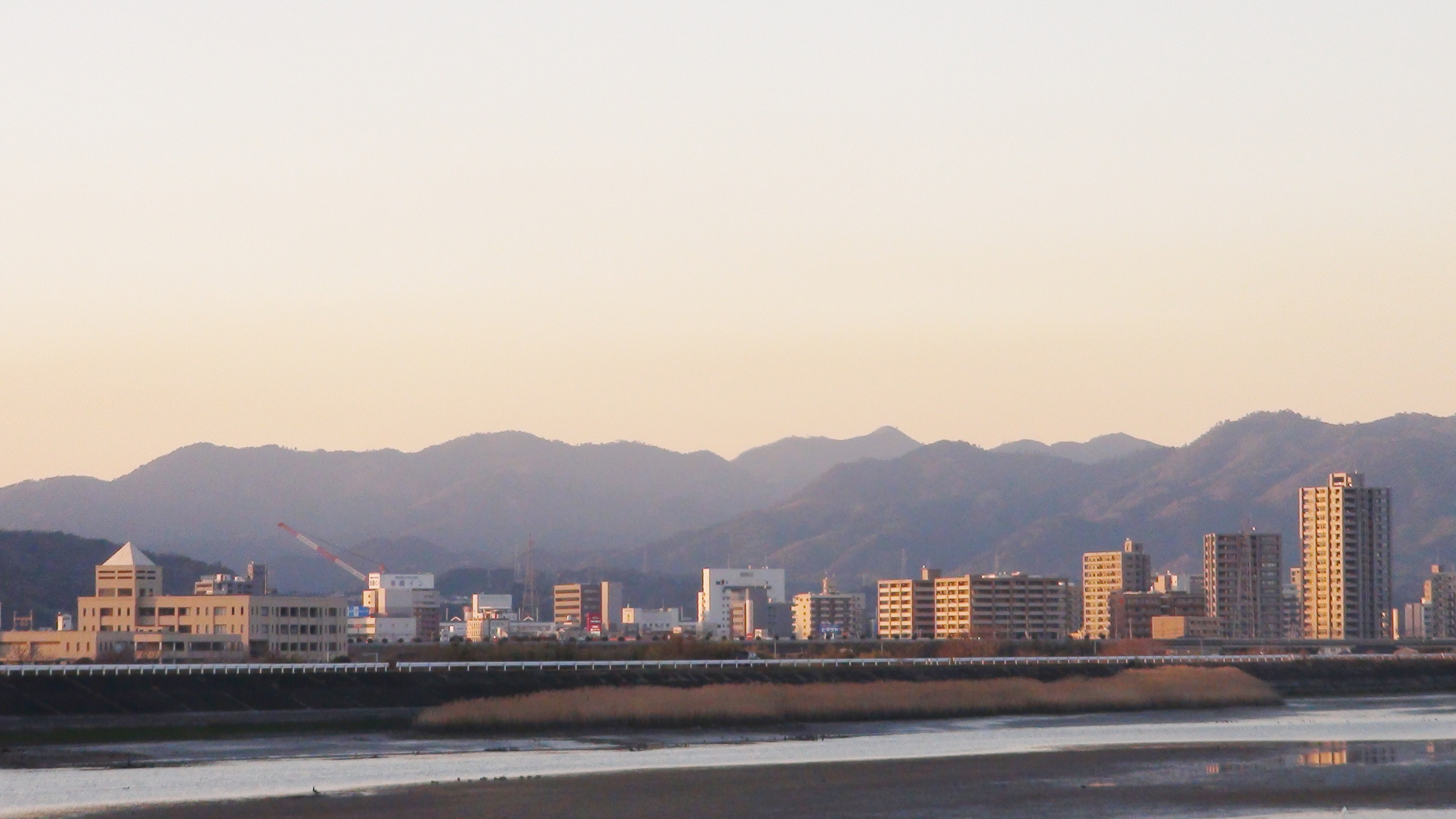 新山口駅南側の市街地